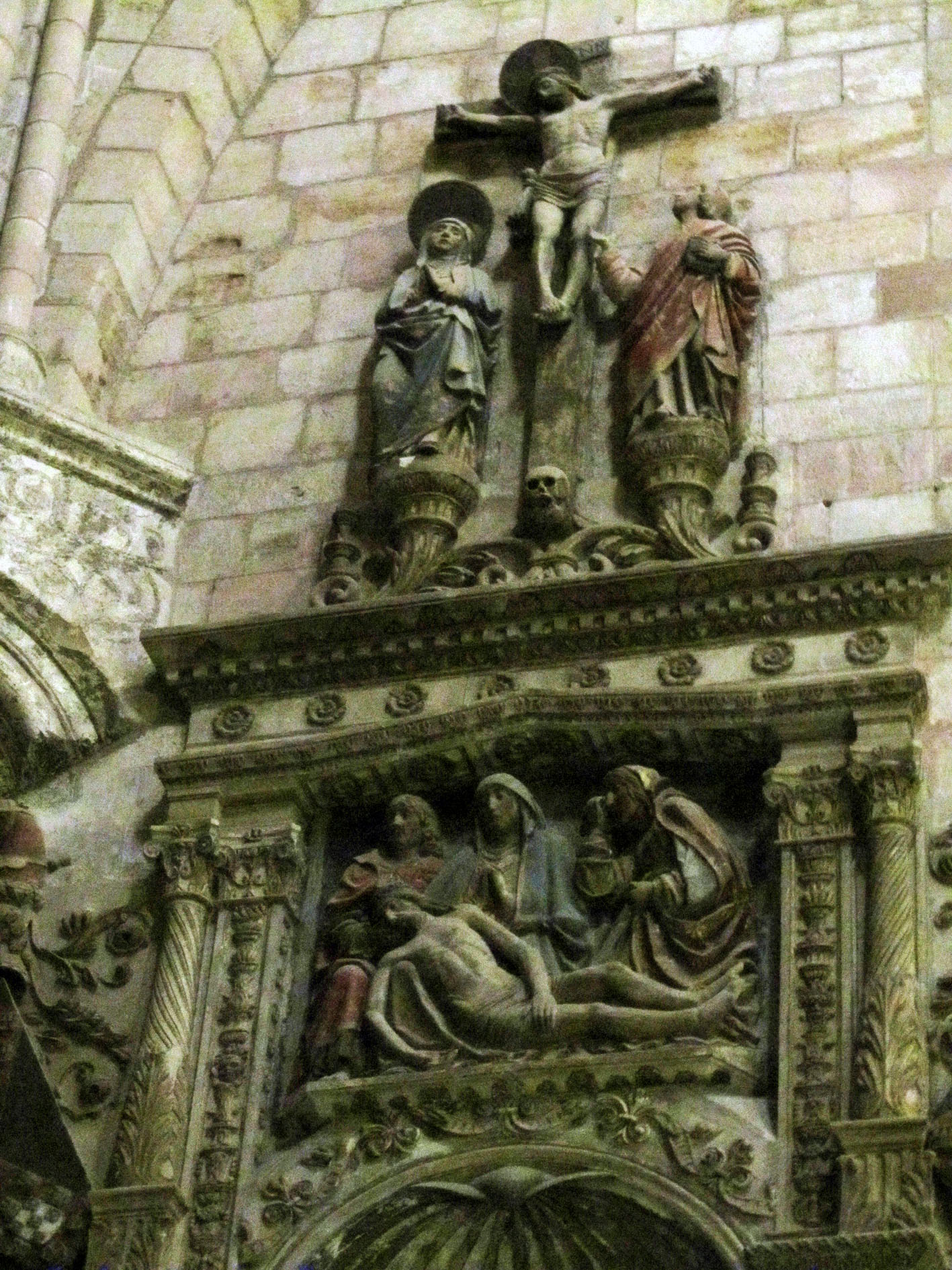 Detalle superior del retablo de D. Fadrique de Portugal en la catedral de Sigüenza (Spain)